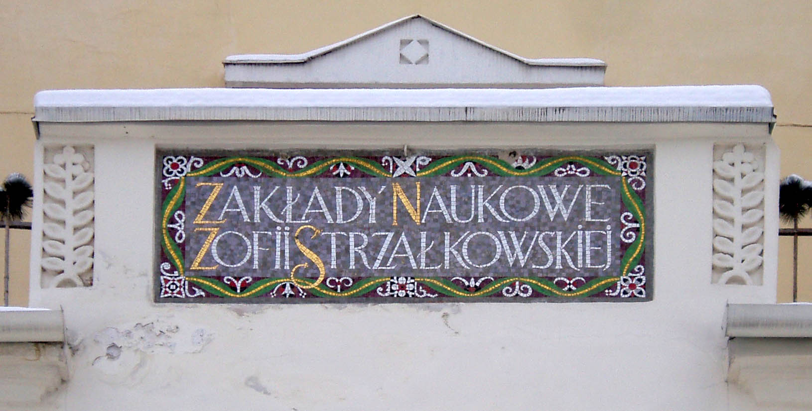 Школа № 6 у Львові. Збудована за проектом Альфреда Захаревича (1871—1937).